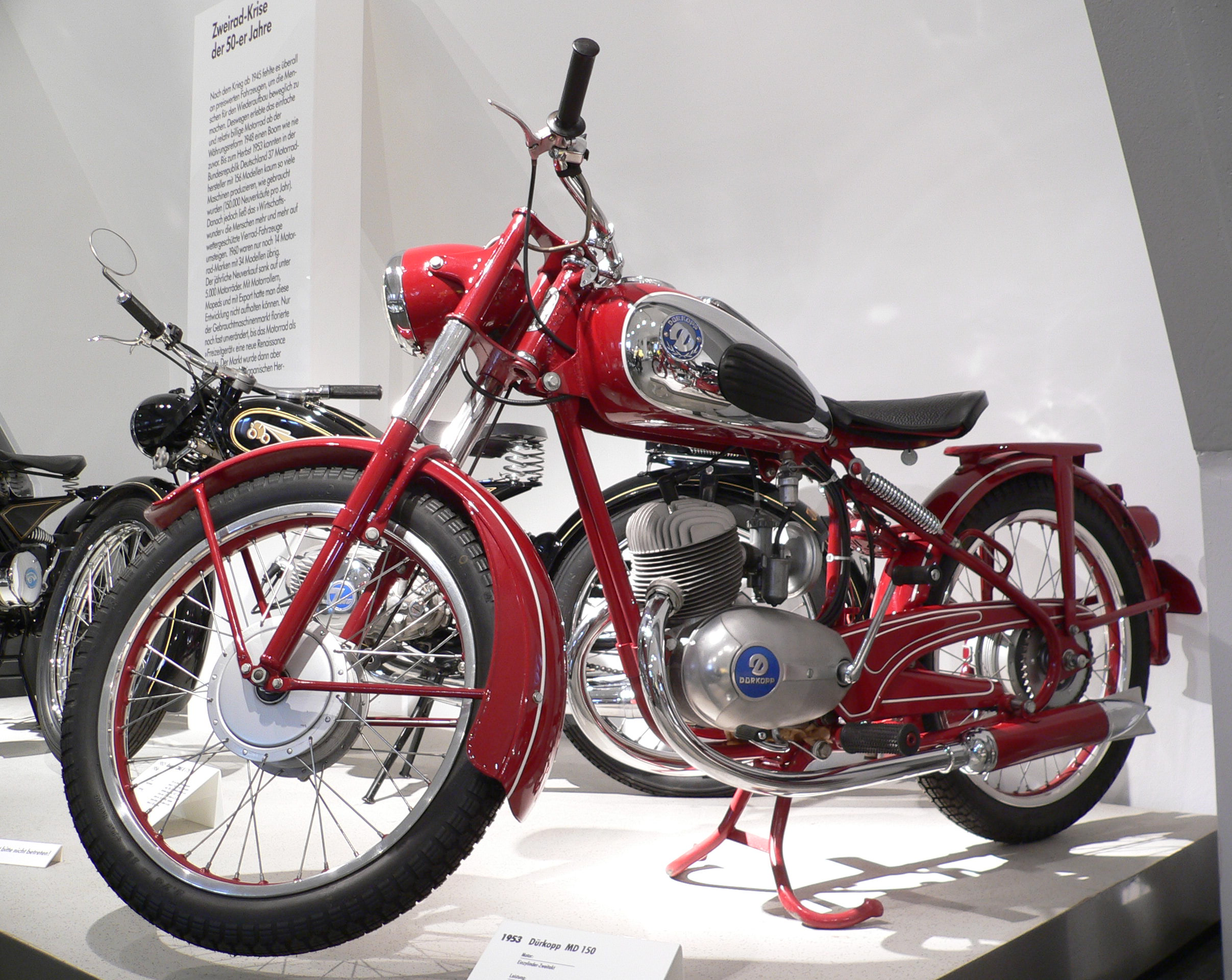 Motorbike "Dürkopp MD 150" (1953) at the Deutsches Zweirad- und NSU-Museum (149,8 cm³, Einzylinder-Zweitakt-Motor, 7,5 PS bei 5.300 U/min.)